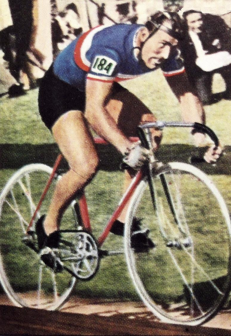 Pierre Trentin en 1969 - PANINI 1969/1970, n°222